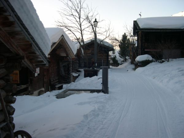 Aufgenommen auf der Alp Sapün